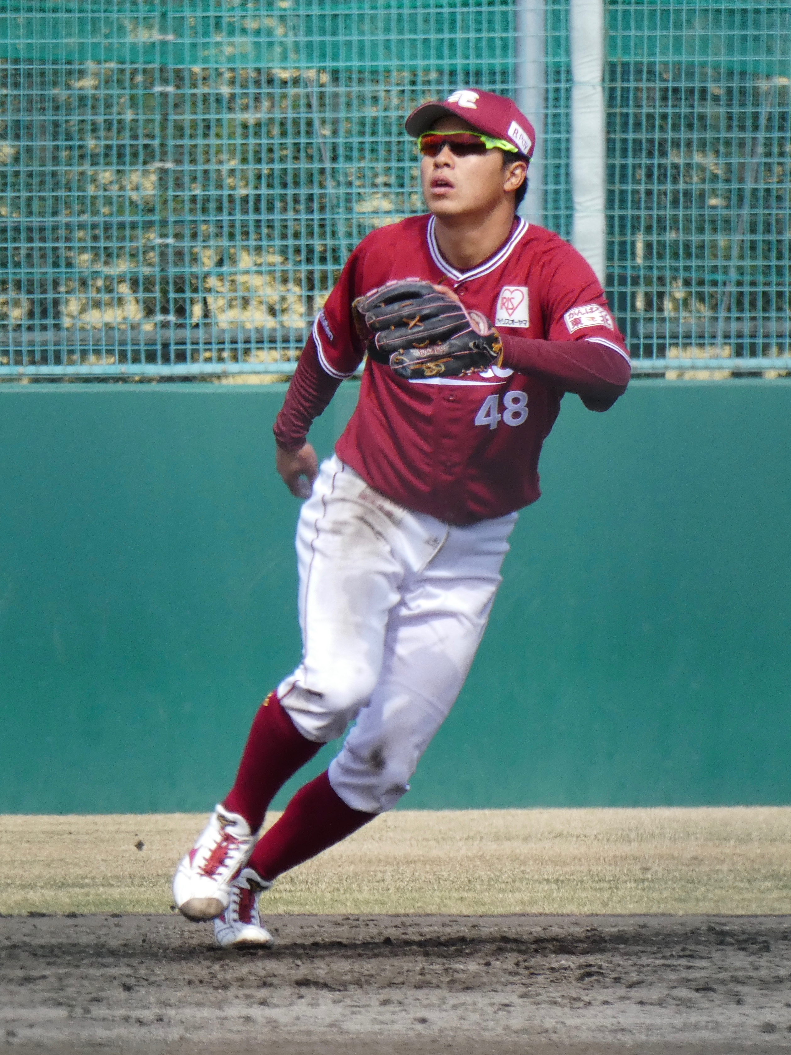 東北楽天ゴールデンイーグルスの選手「渡辺佳明」。ロッテ浦和球場にて。